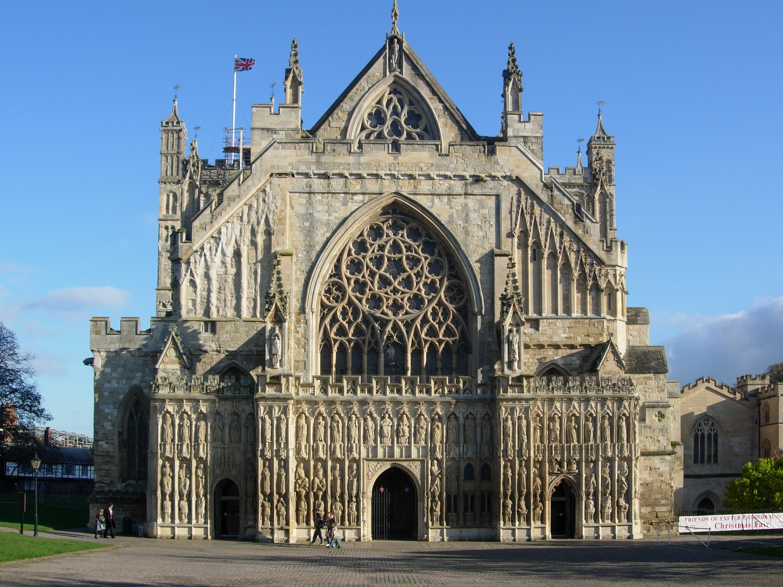 Bildbeschreibung: Kathedrale von Exeter Fotograf/Zeichner: Torsten Schneider Datum: 13. Nov 2005